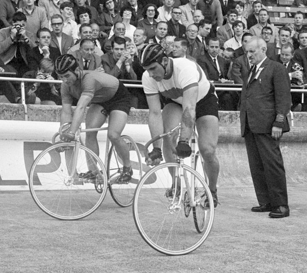 WK Wielrennen. Kwartfinale sprint amateurs. Teddy Turini (links) tegen Rus Phakadze 11,5 minuten "sur place"